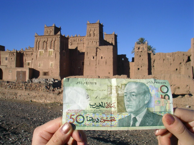 Kasbah of Amerhidil, near SkouraSANY1702